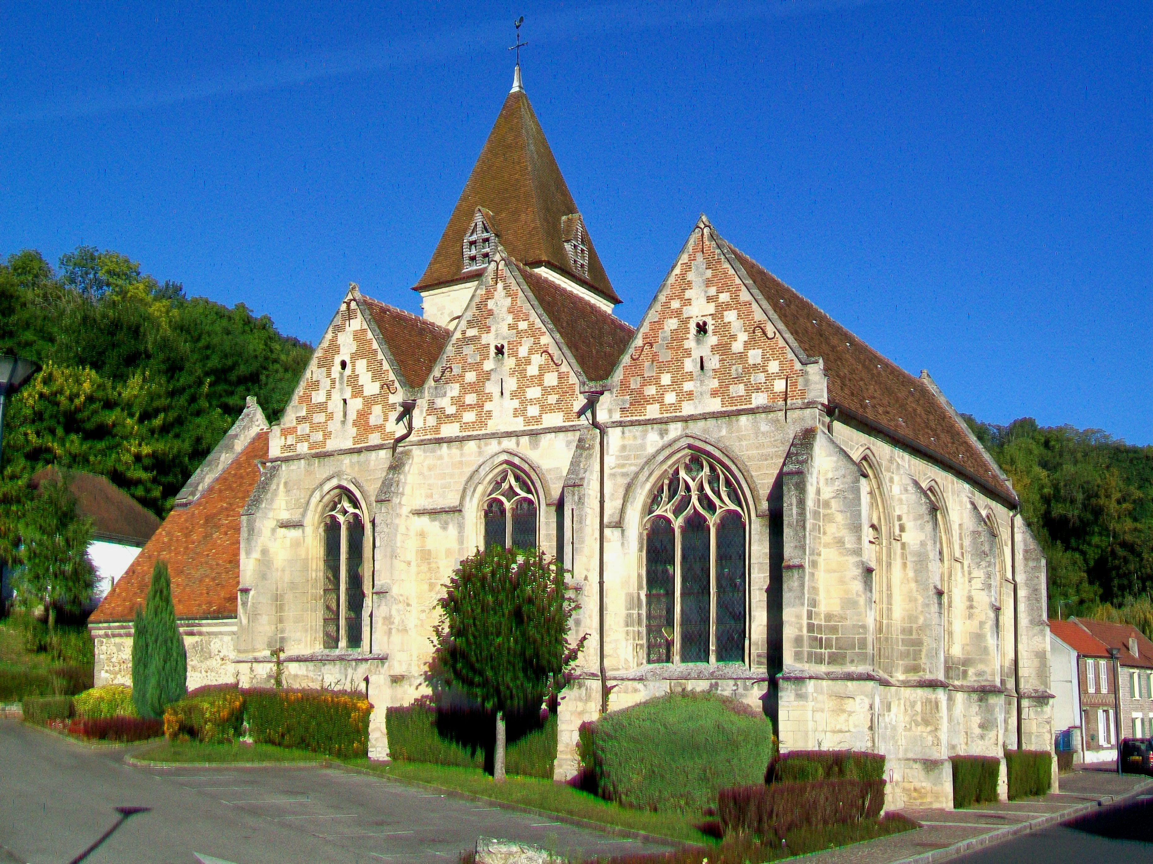 Vue d'ensemble de l'église depuis l'est.